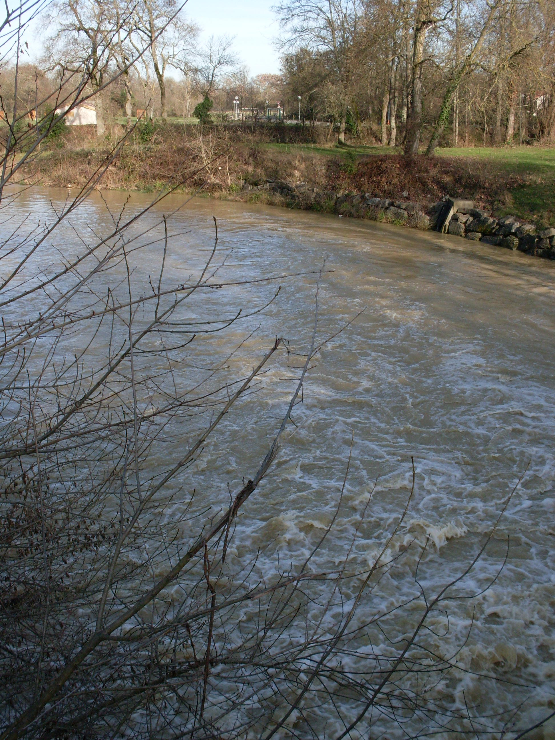 Le Touch à Tournefeuille